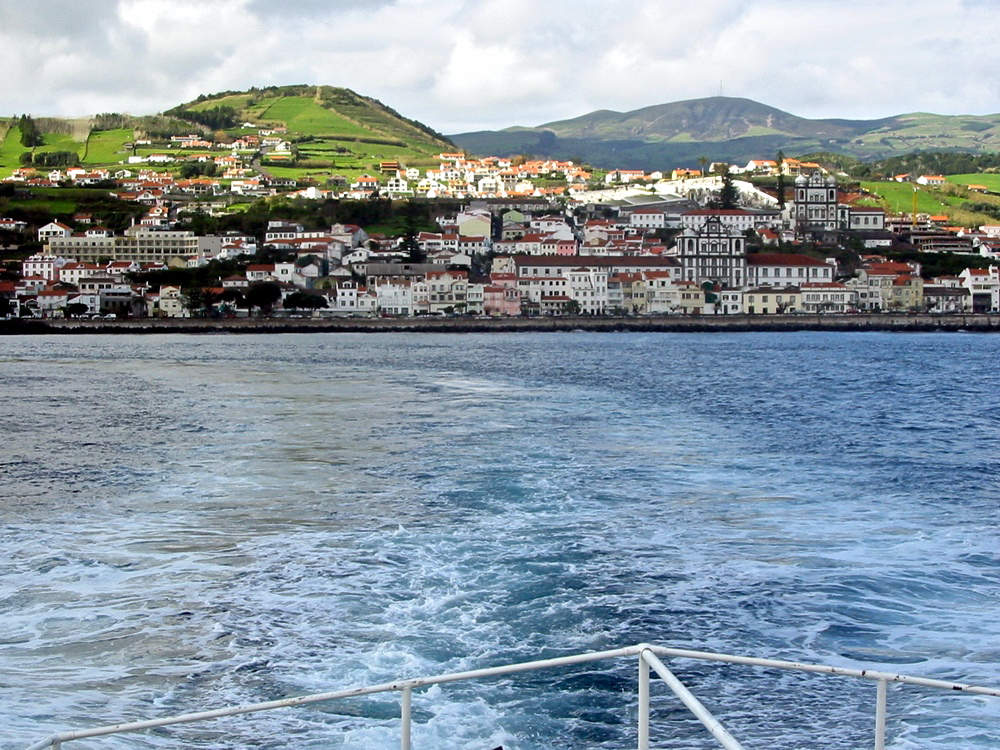 Bom tempo no canal (Horta, Açores)